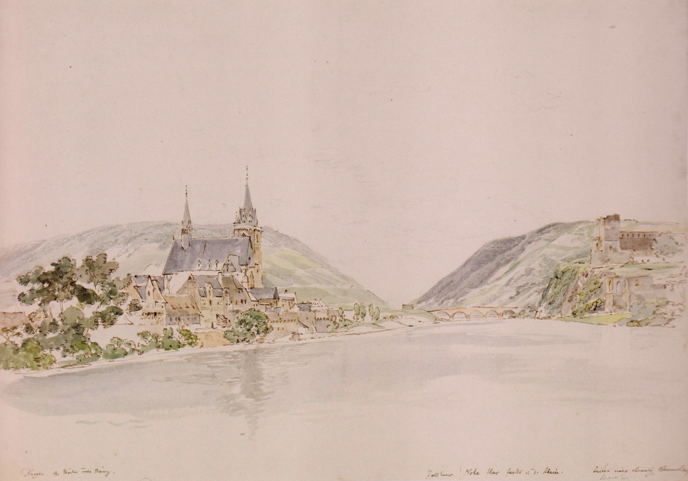 Johann Christian Reinhart: Ansicht von Bingen mit der Drususbrücke. Aquarell, Feder in Braun, über Graphit, 1787. 34,1 x 46,8 cm. Nürnberg, Germanisches Nationalmuseum